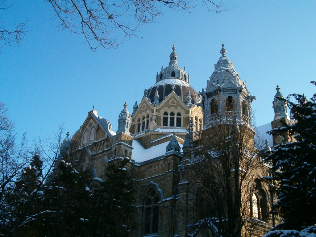 Szeged, Zsinagóga